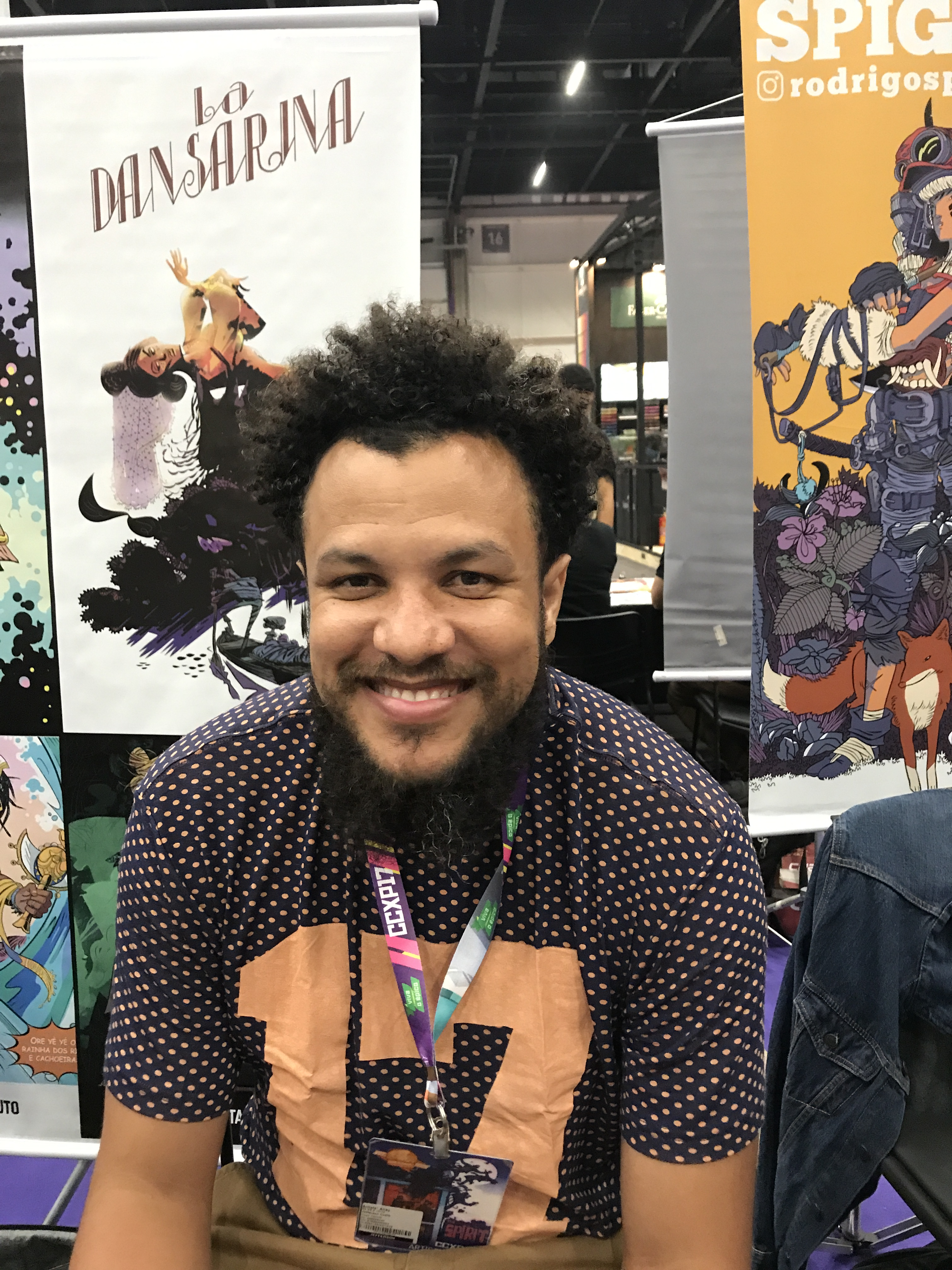 Artista Jefferson Costa na edição de 2017 da Comic Con Experience